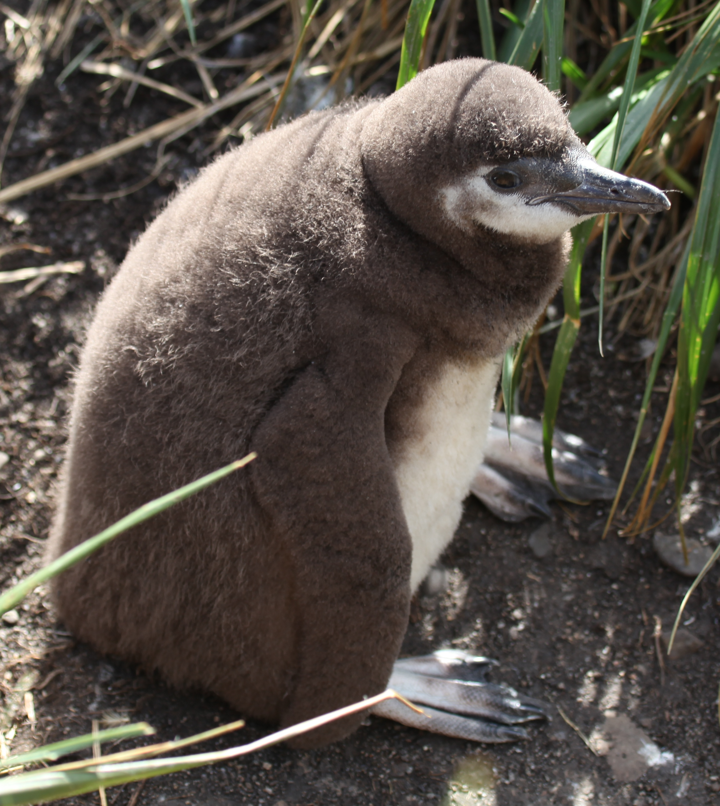 At Isla Martillo in Tierra del Fuego, Argentina.